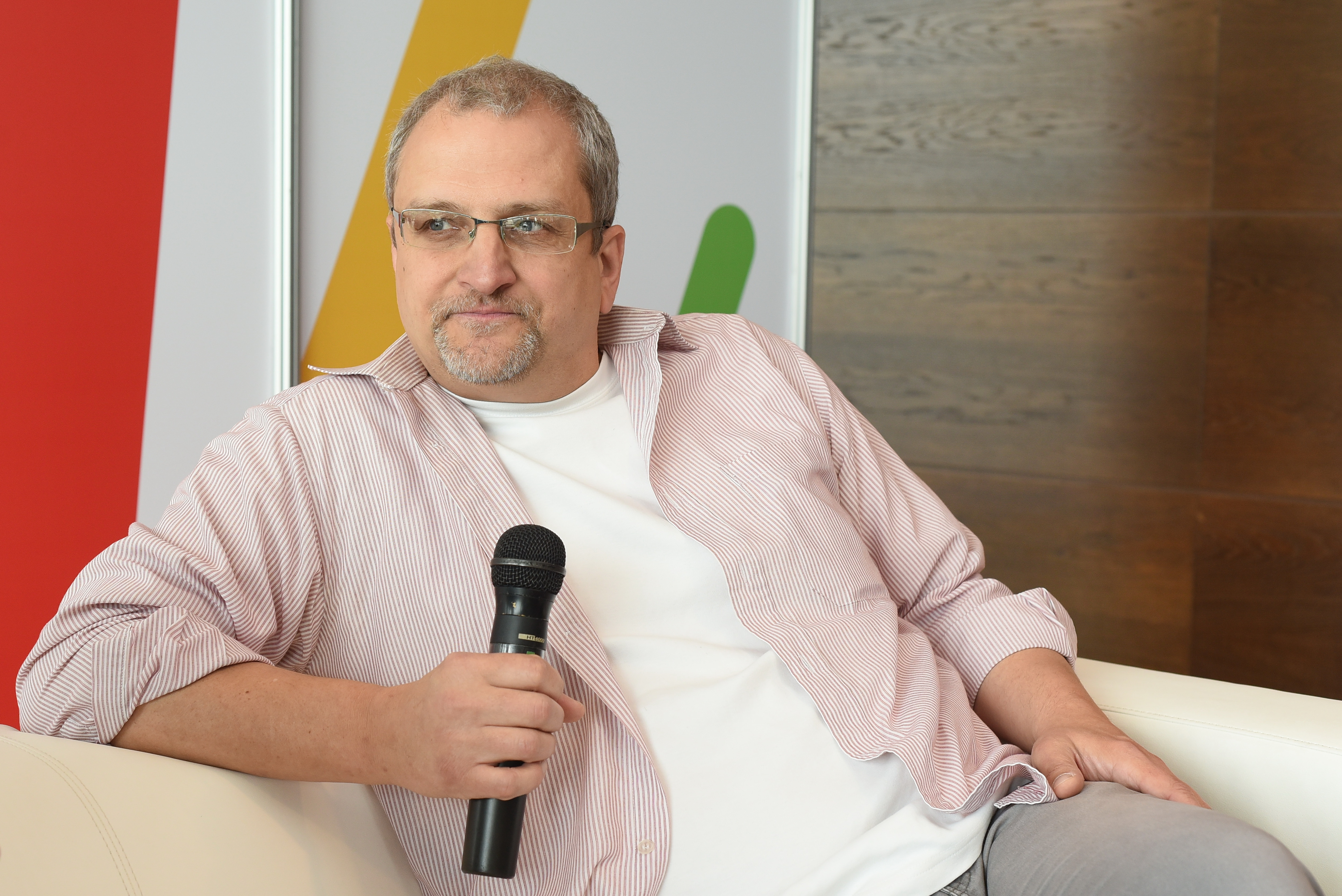 Pisarz Marcin Ciszewski na Warszawskich Targach Książki 2018.